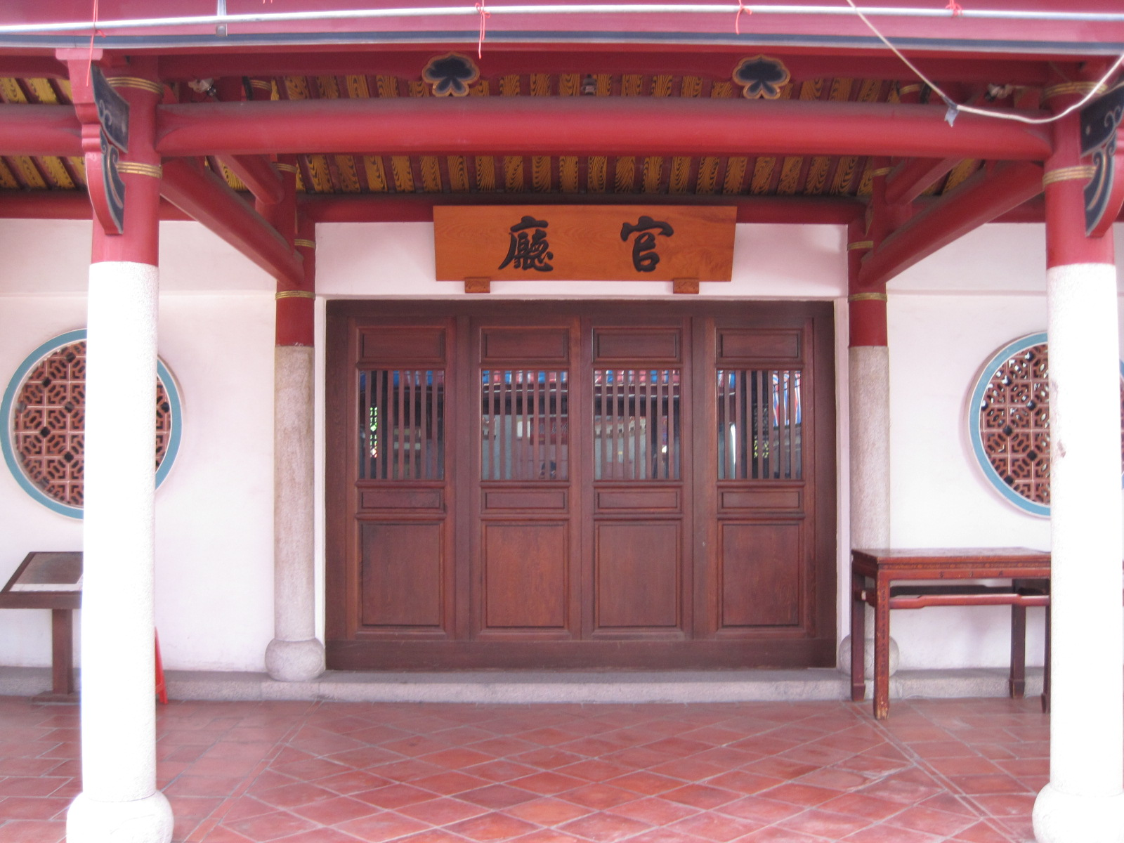 大觀音亭興濟宮官廳房間